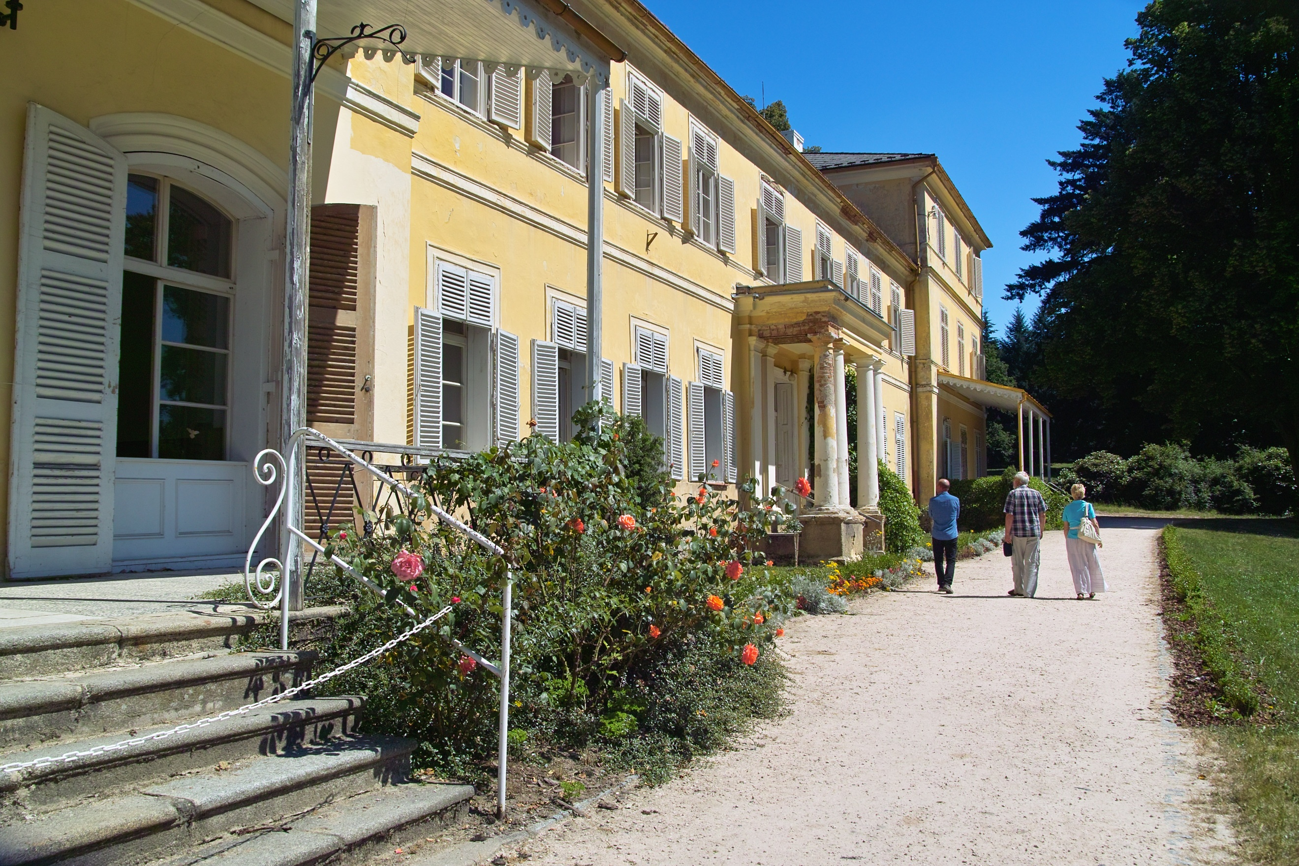 Zámek Lázeň, čp. 60, pod Bolfánkem, Chudenice.